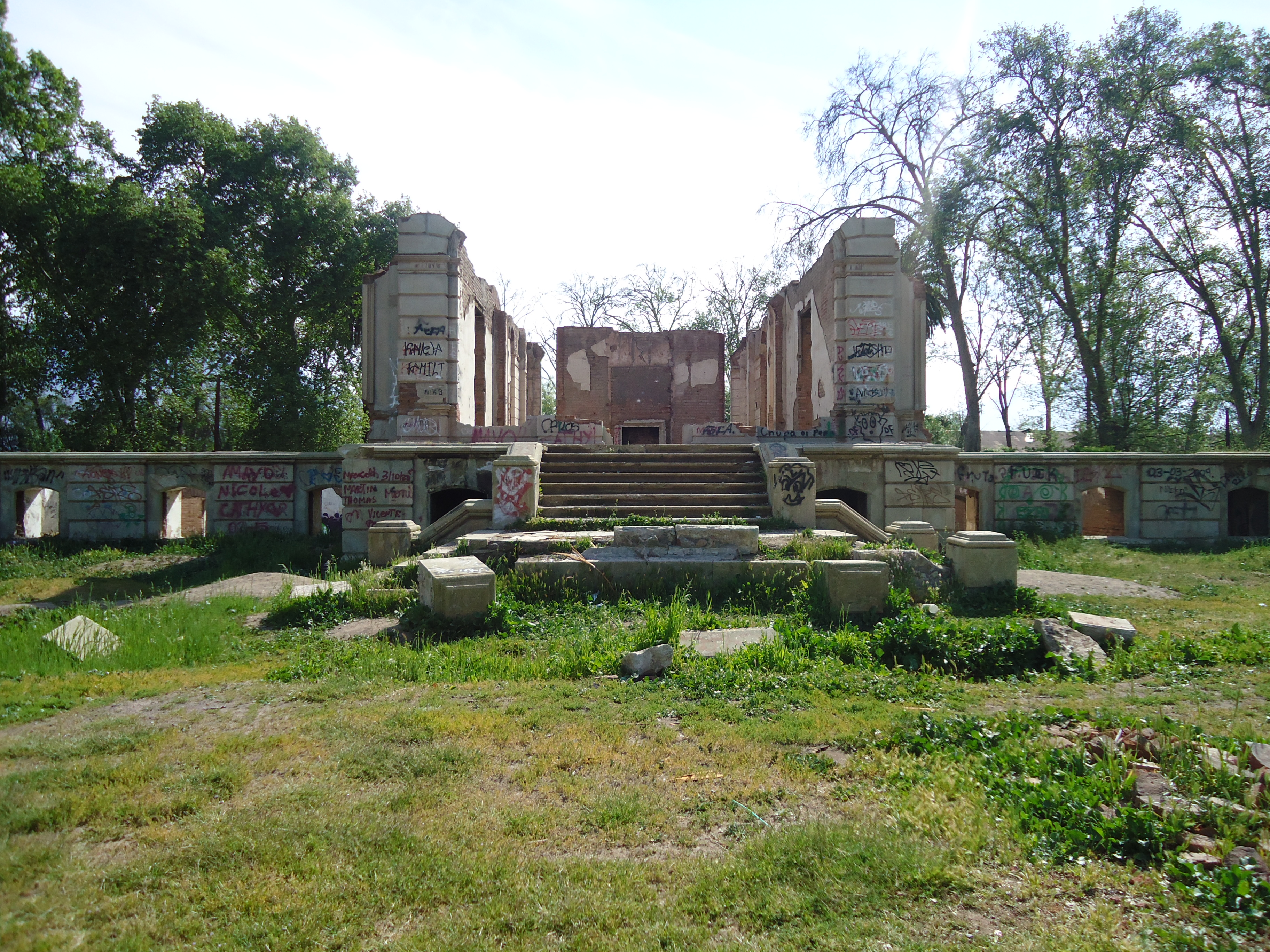 Ruinas 2015